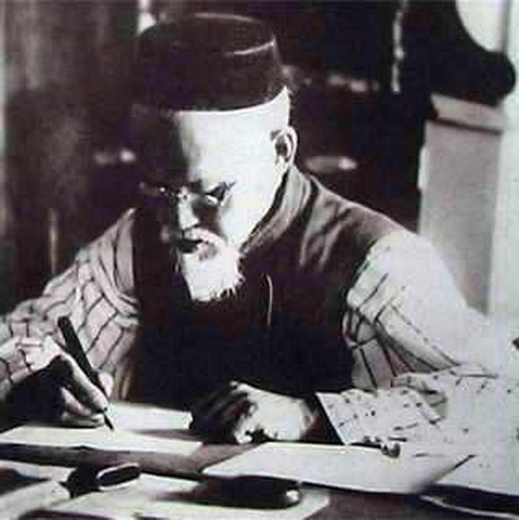 Фахретдинов, Ризаитдин Фахретдинович — выдающийся татарский писатель-просветитель, учёный-востоковед, религиозный деятель.